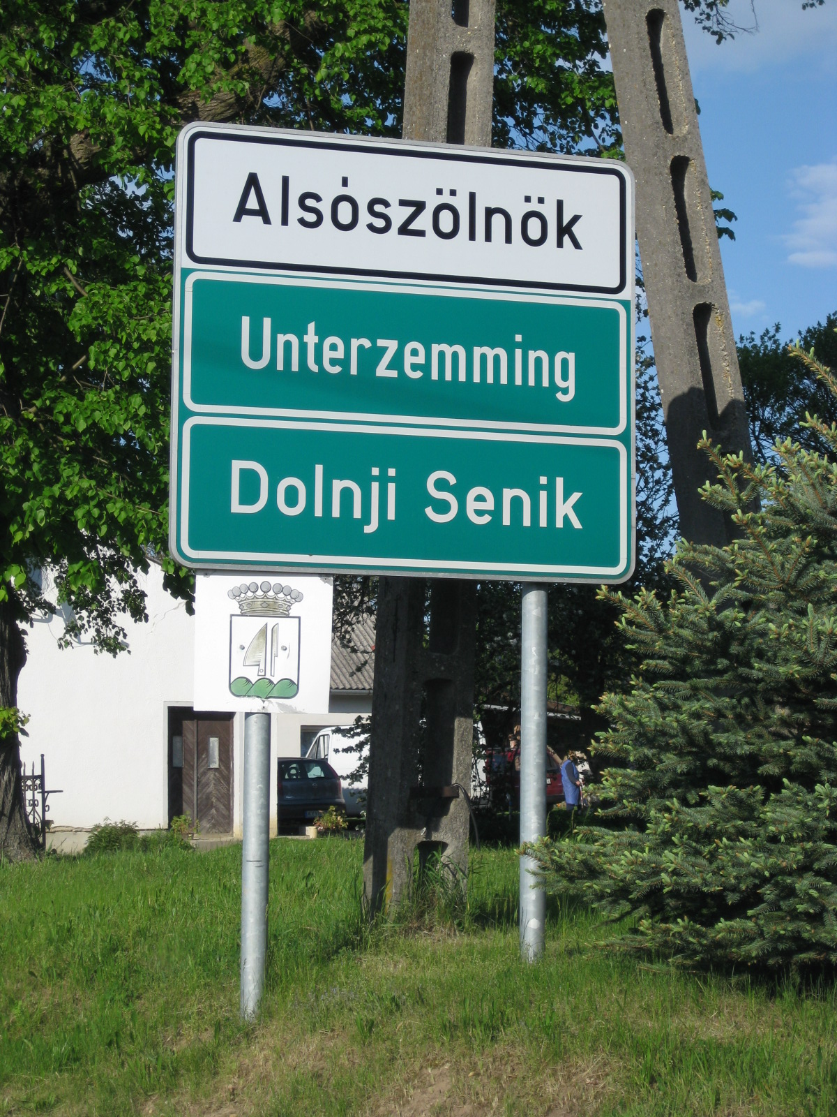 Dolnji senik- krajevna trojezična tabla, Porabje, Madžarska